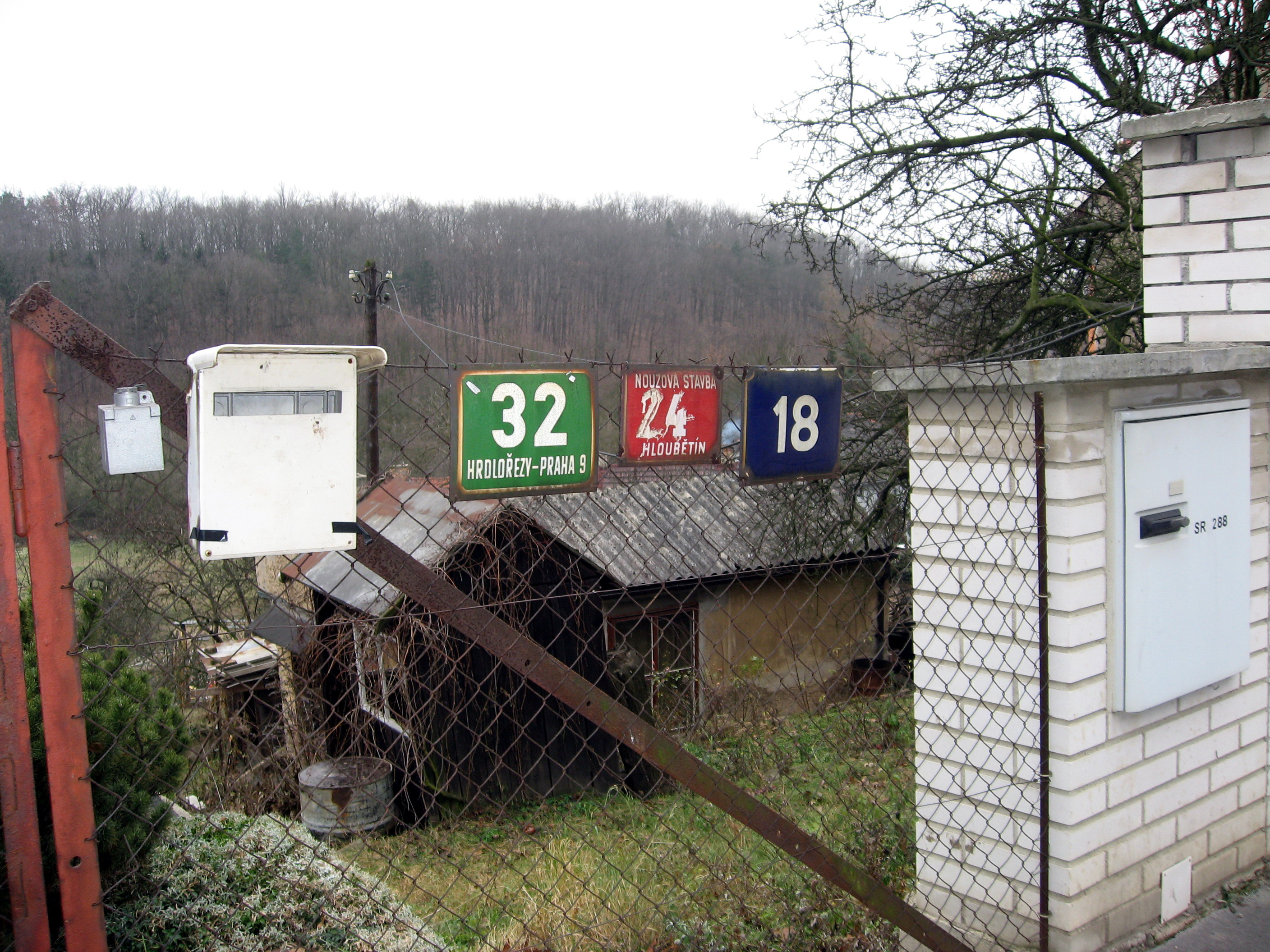 Mezitraťová, značení domu. Zřejmě jde o dům Mezitraťová če. 32 příslušející k Hrdlořezům. Dům oficiálně nemá přiřazeno číslo orientační, ale nachází se mezi domy čo. 16 a 20. Původ a význam hloubětínského č. ev. 24 není zřejmý, aktuálně není v Hloubětíně če. 24 evidováno.